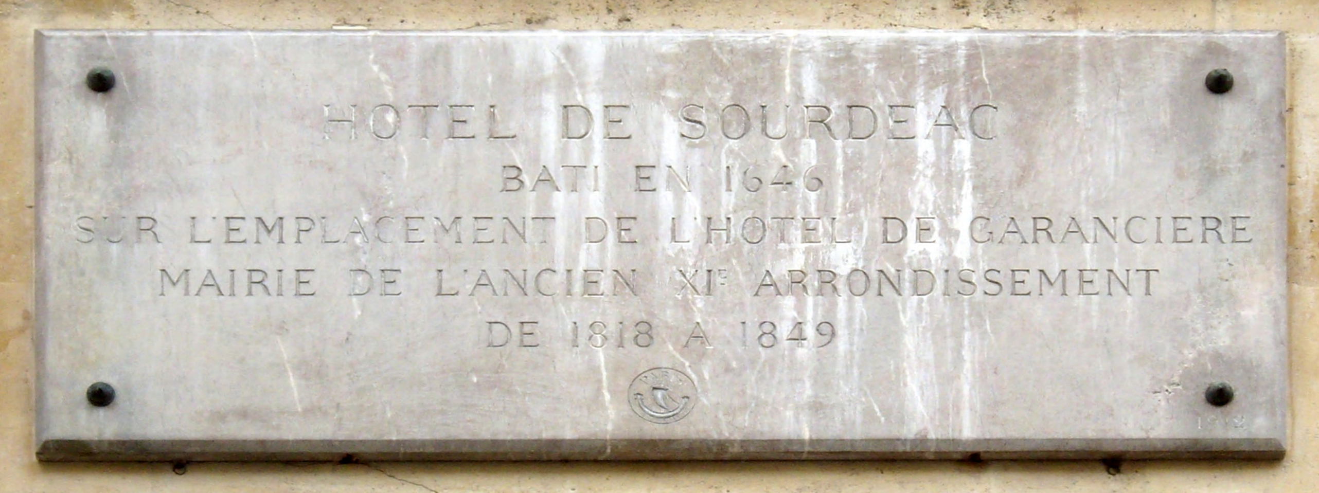 Plaque apposée sur la façade de l'hôtel de Sourdéac, au n° 8 de la rue Garancière, Paris 6e.« Hôtel de Sourdéac bâti en 1646 sur l'emplacement de l'hôtel de Garancière. Mairie de l'ancien XIe arrondissement de 1818 à 1849. »